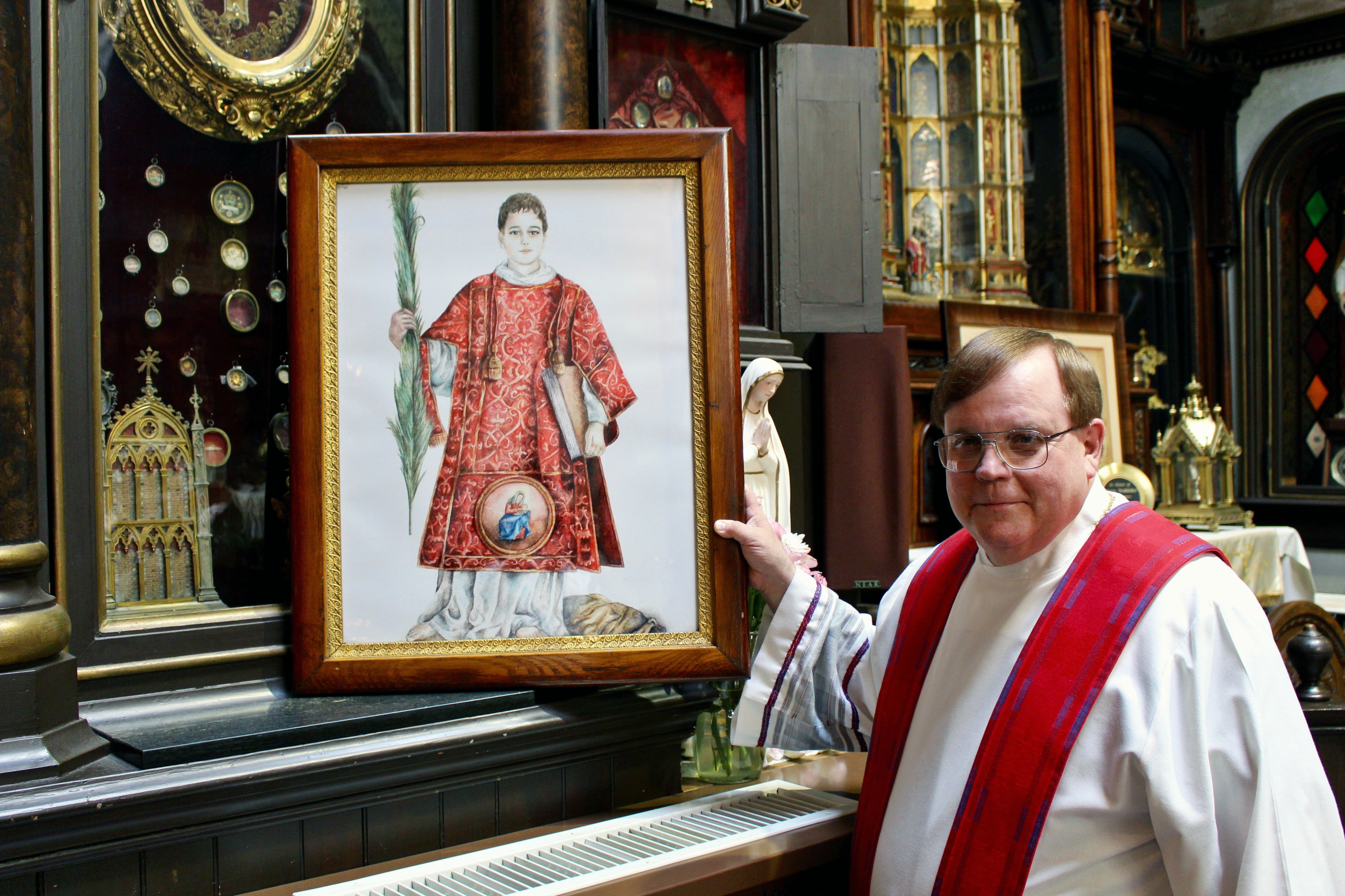 Pittsburgh (Pennsylvania), Saint Anthony’s Chapel, Fr. James Orr accanto al reliquiario-calendario, contenente un frammento osseo di S. Cesario diacono e martire, e all'icona "Caesarius Diaconus".